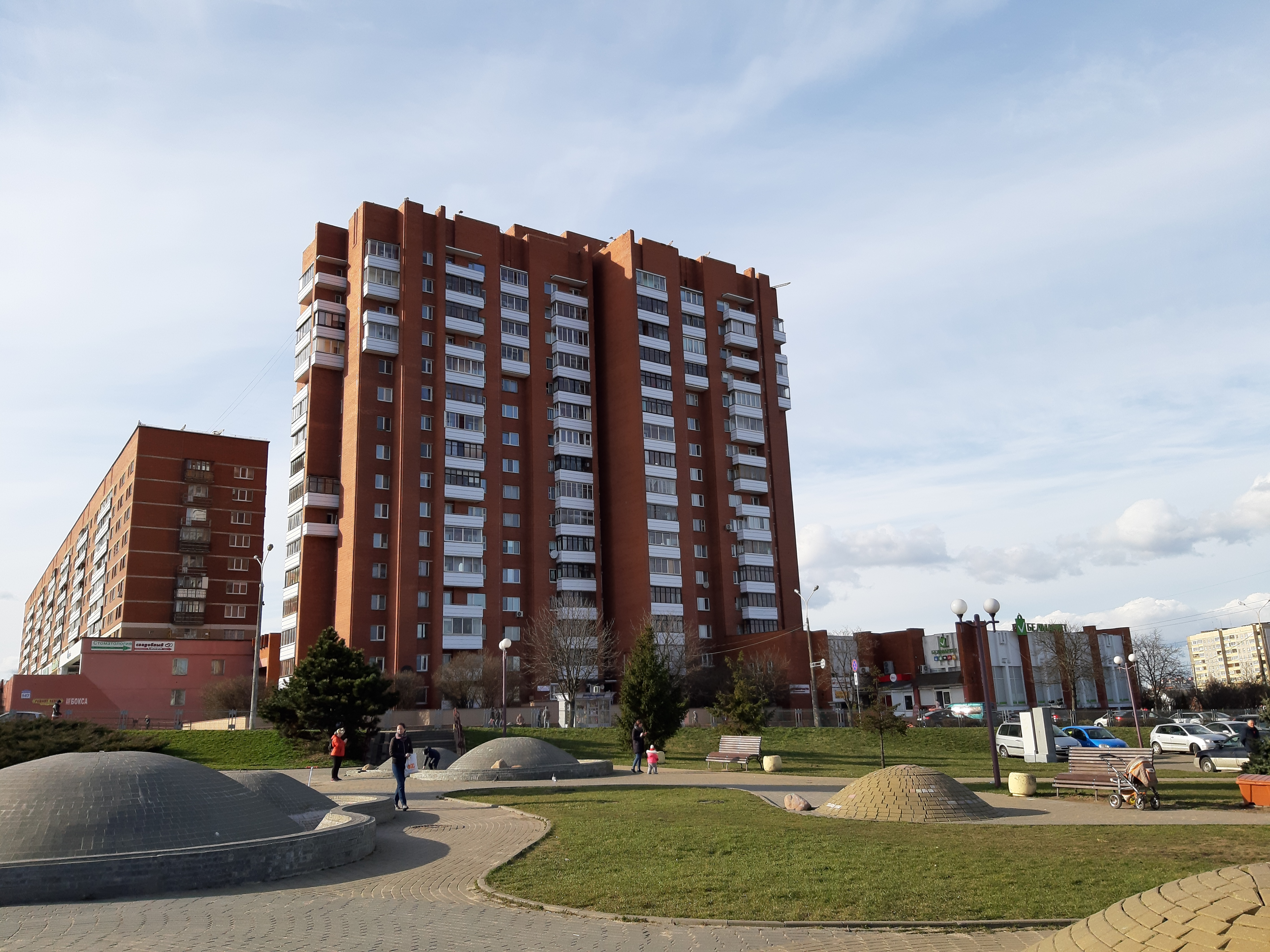 Мінск. Сквер Беларусь партызанская